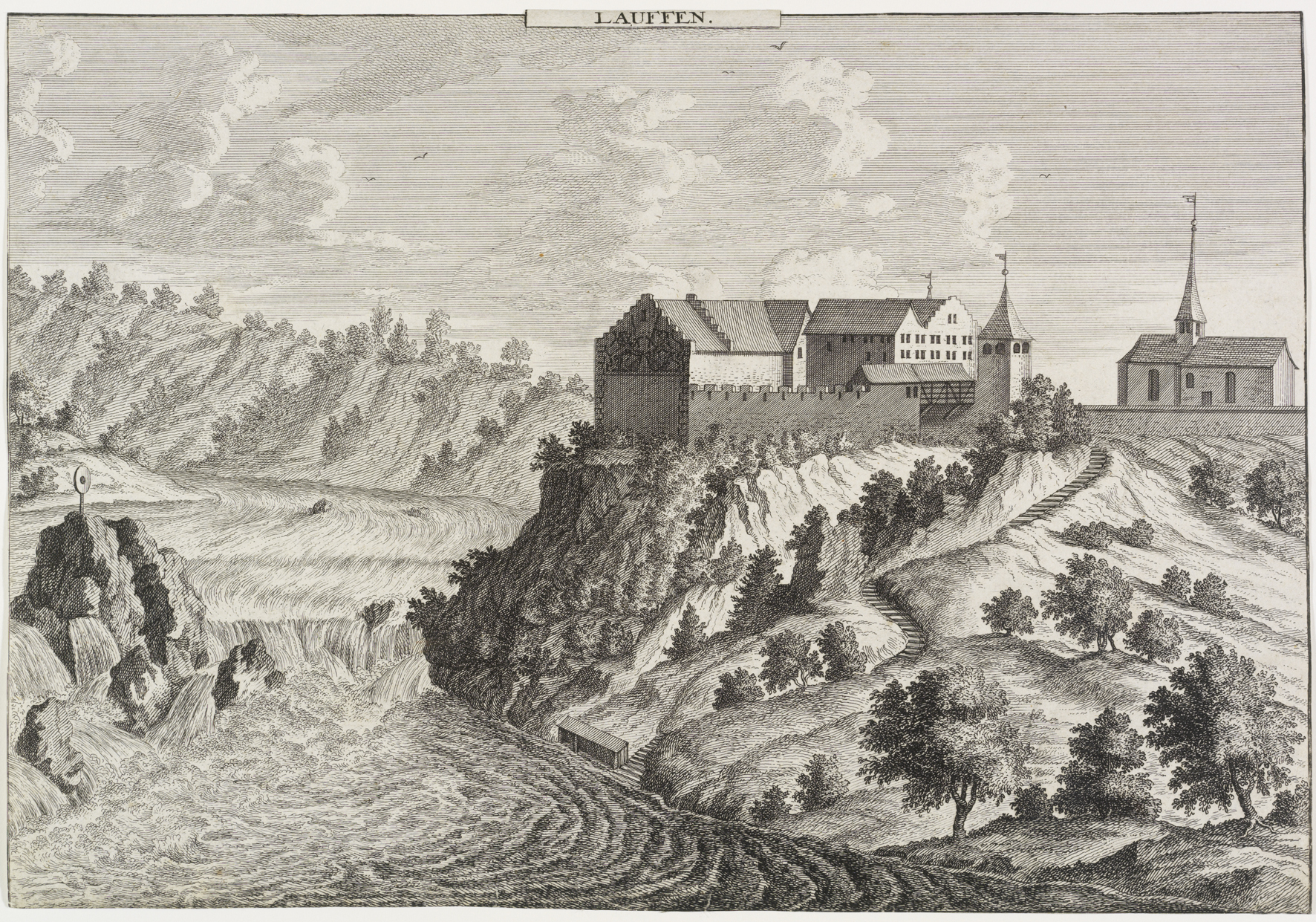 Schloss Laufen mit Rheinfall. Um 1750. Kupferstich. 21.6 x 31.4 cm